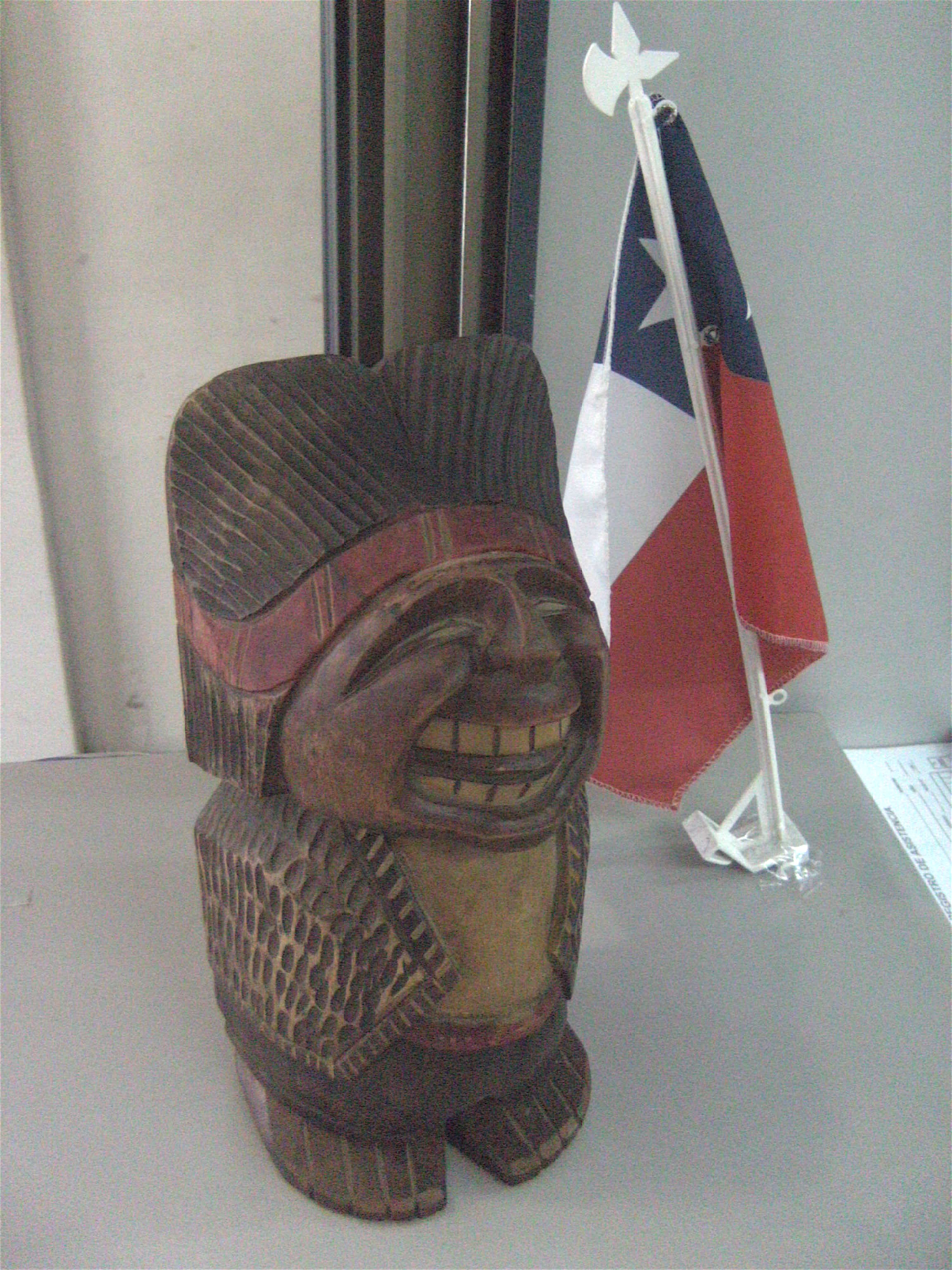 Souvenir tradicional chileno consistente en un muñeco con un mecanismo que como broma al ser levantado muestra sus órganos sexuales.